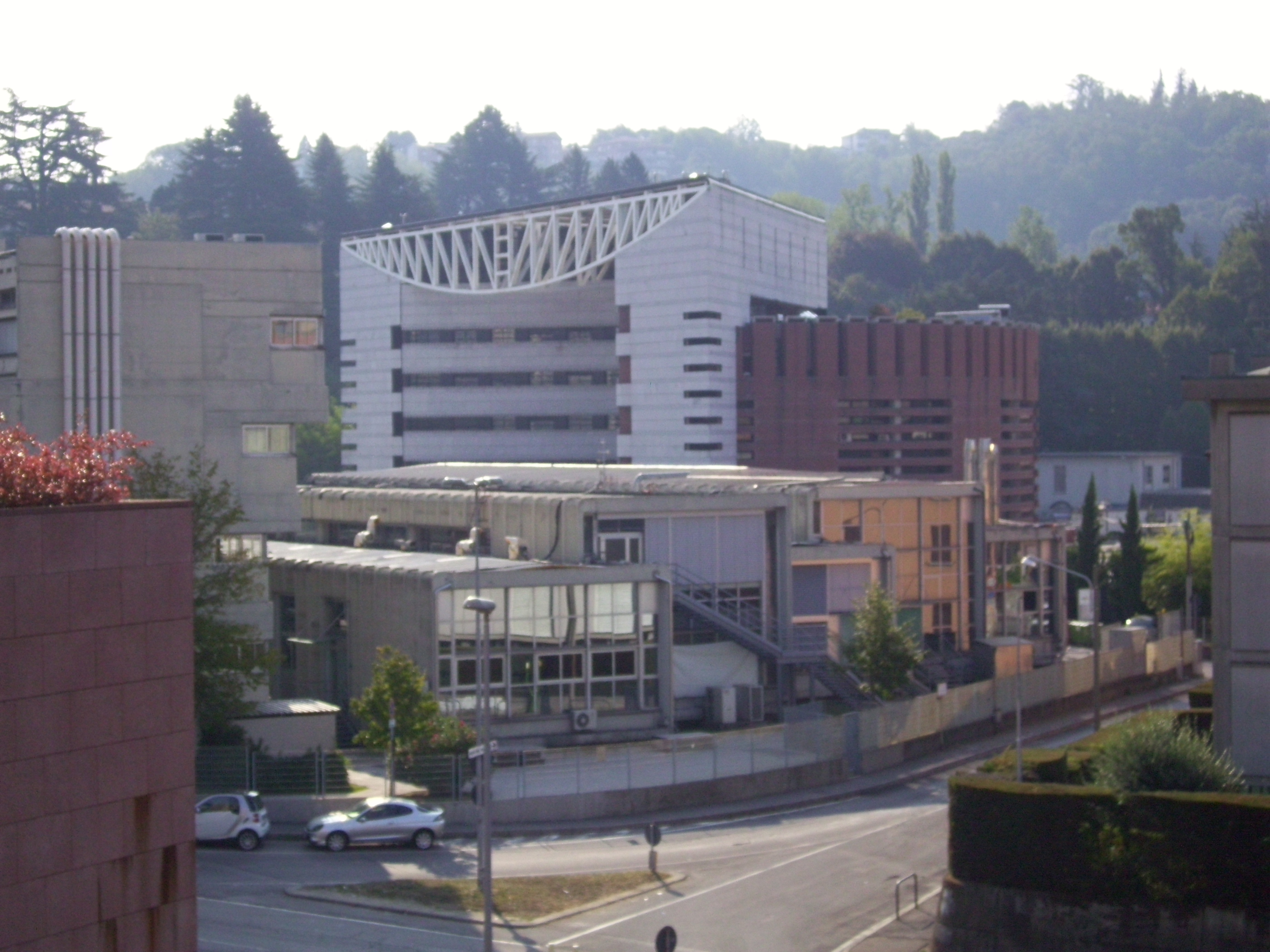 parte degli edifici che ospitano il polo universitario comasco, condiviso da Politecnico di Milano e Università dell'Insubria